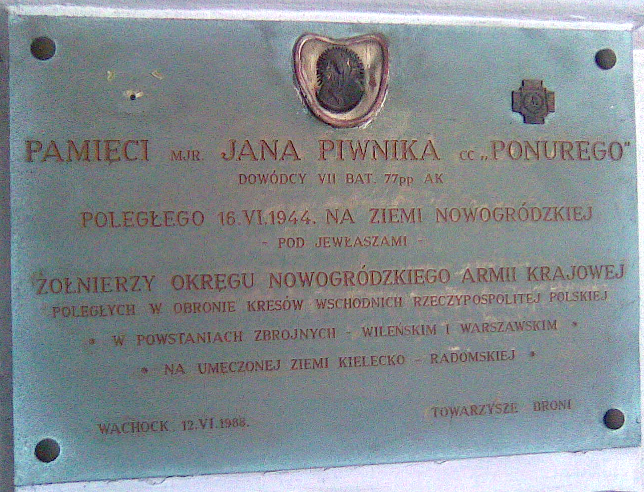 Tablica pamiątkowa mjr. Jana Piwnika "Ponurego" w krużgankach kościoła p. w. Św. Antoniego z Padwy przy ul. Senatorskiej 31 w Warszawie